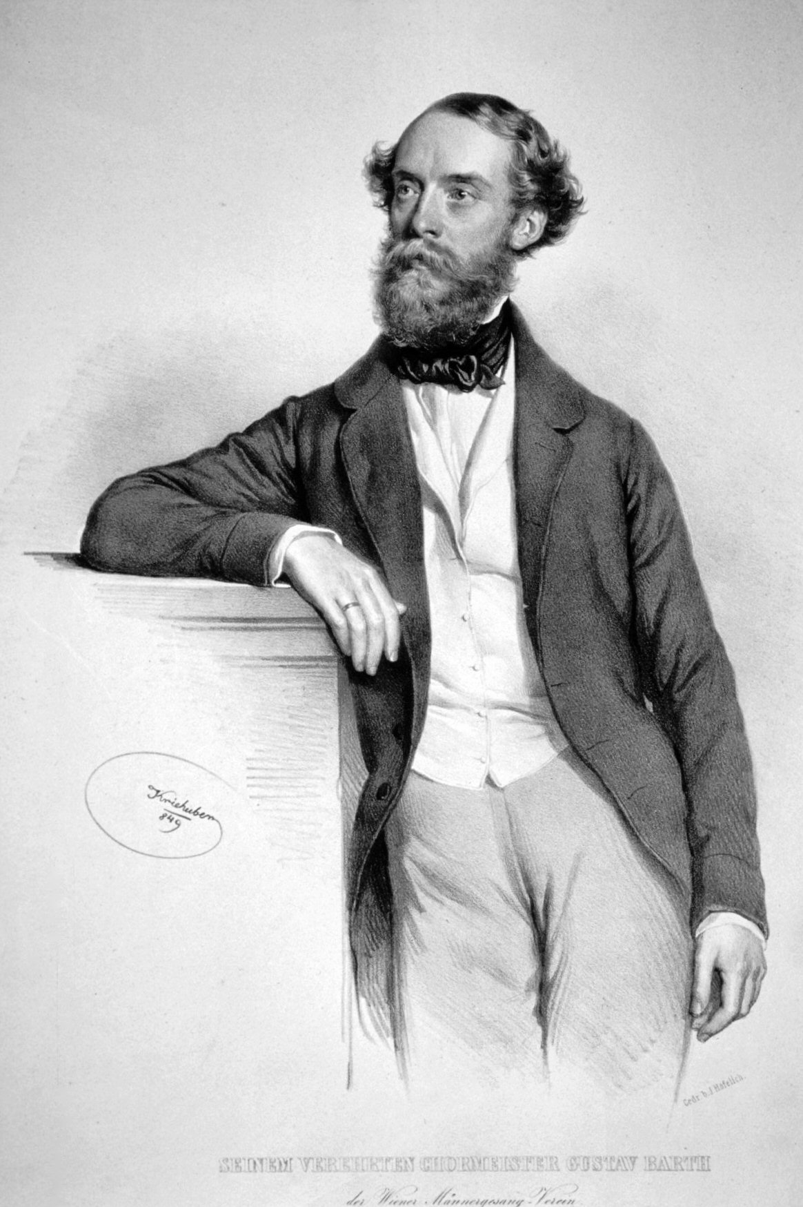 Gustav Barth (1811-1897), Dirigent, Komponist, Chorleiter des Wiener Männergesangsverein.